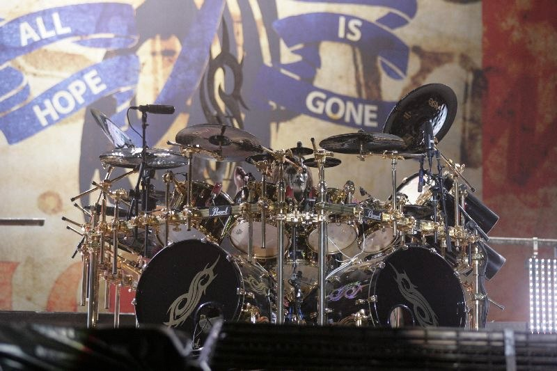 Quelle: novarock.at